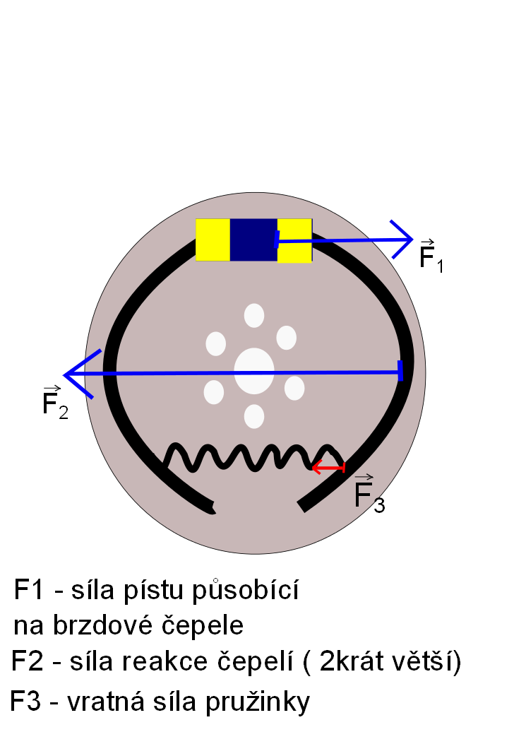 bubnová brzda - fyzikální popis